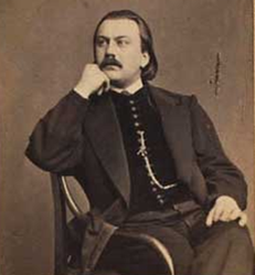 Edmund Neupert - norsk pianist og komponist (norwegian compopser and Pianist)